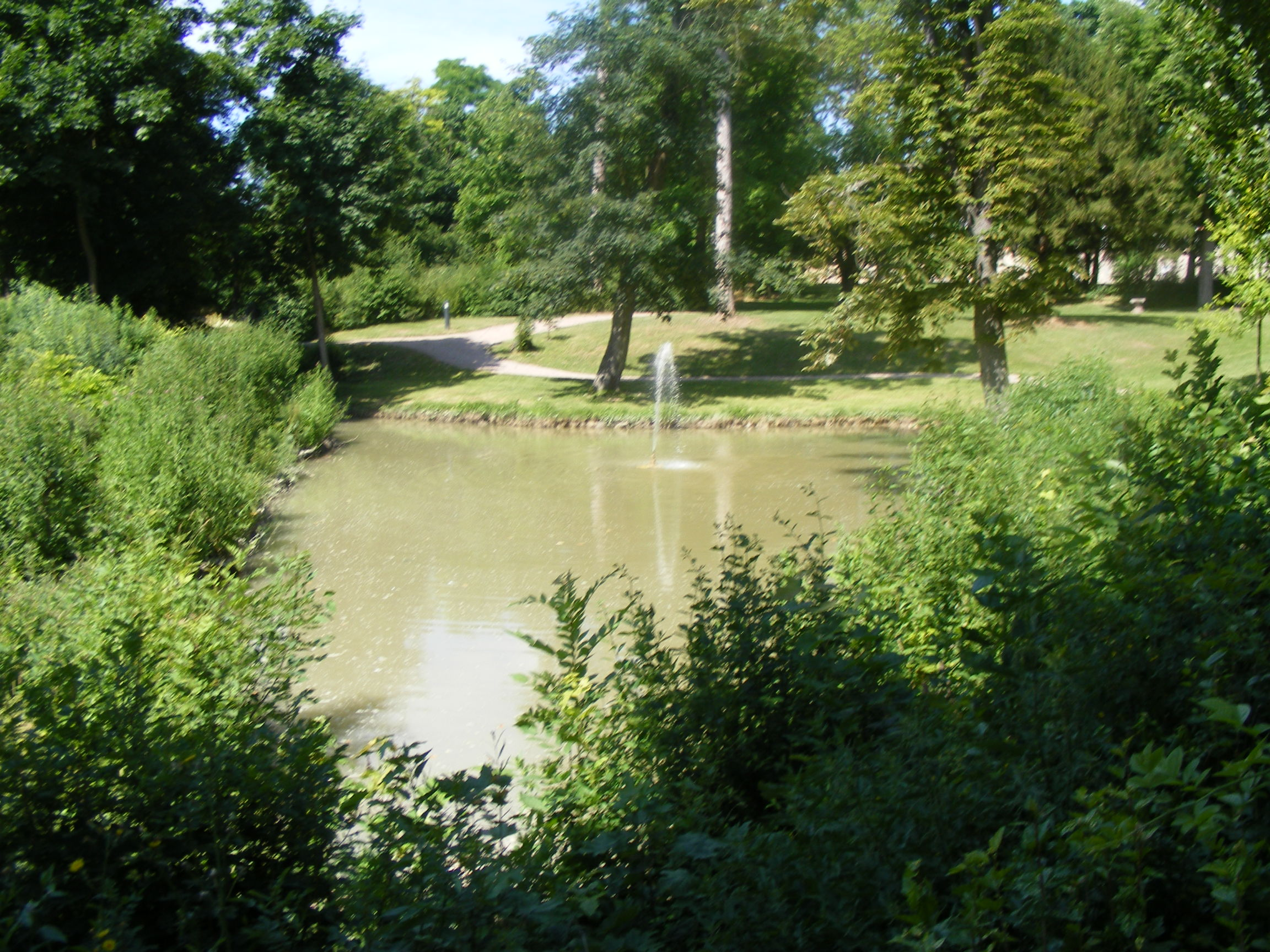 Dirmstein, Koeth-Wanscheidsches Schloss: Teich im Schlosspark